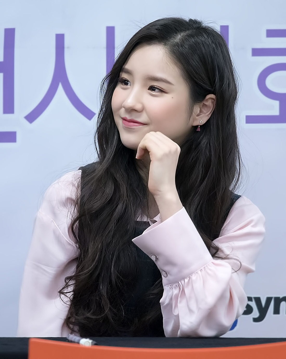 2017.01.22 용산 이달의소녀 팬 사인회 희진 by 엔타로